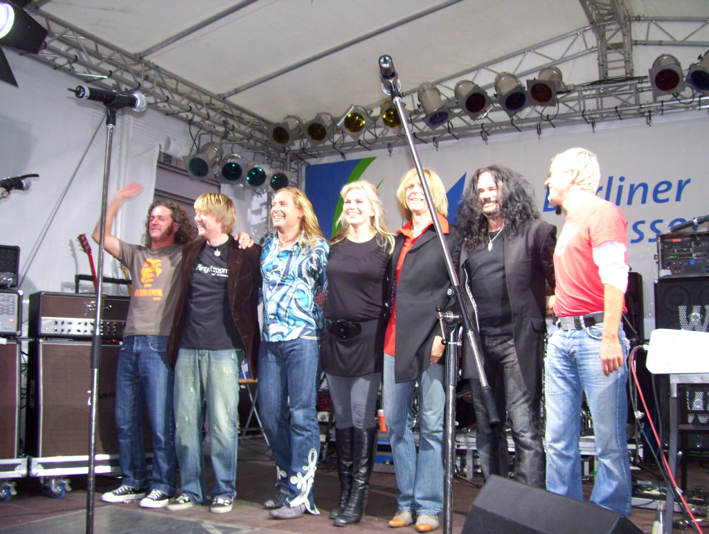 Silly nach einem Konzert am 01.09.2007 in Berlin, Silly spielte eintrittsfrei!